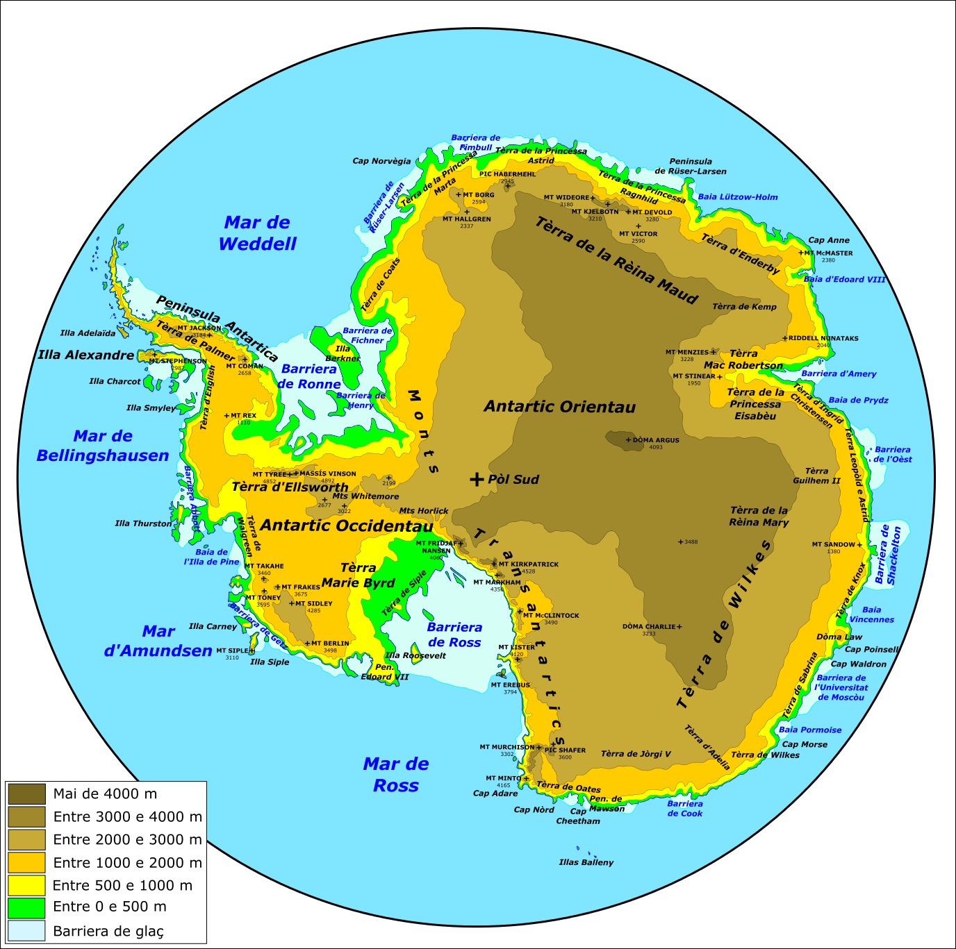 Topografia de l'Antartic.